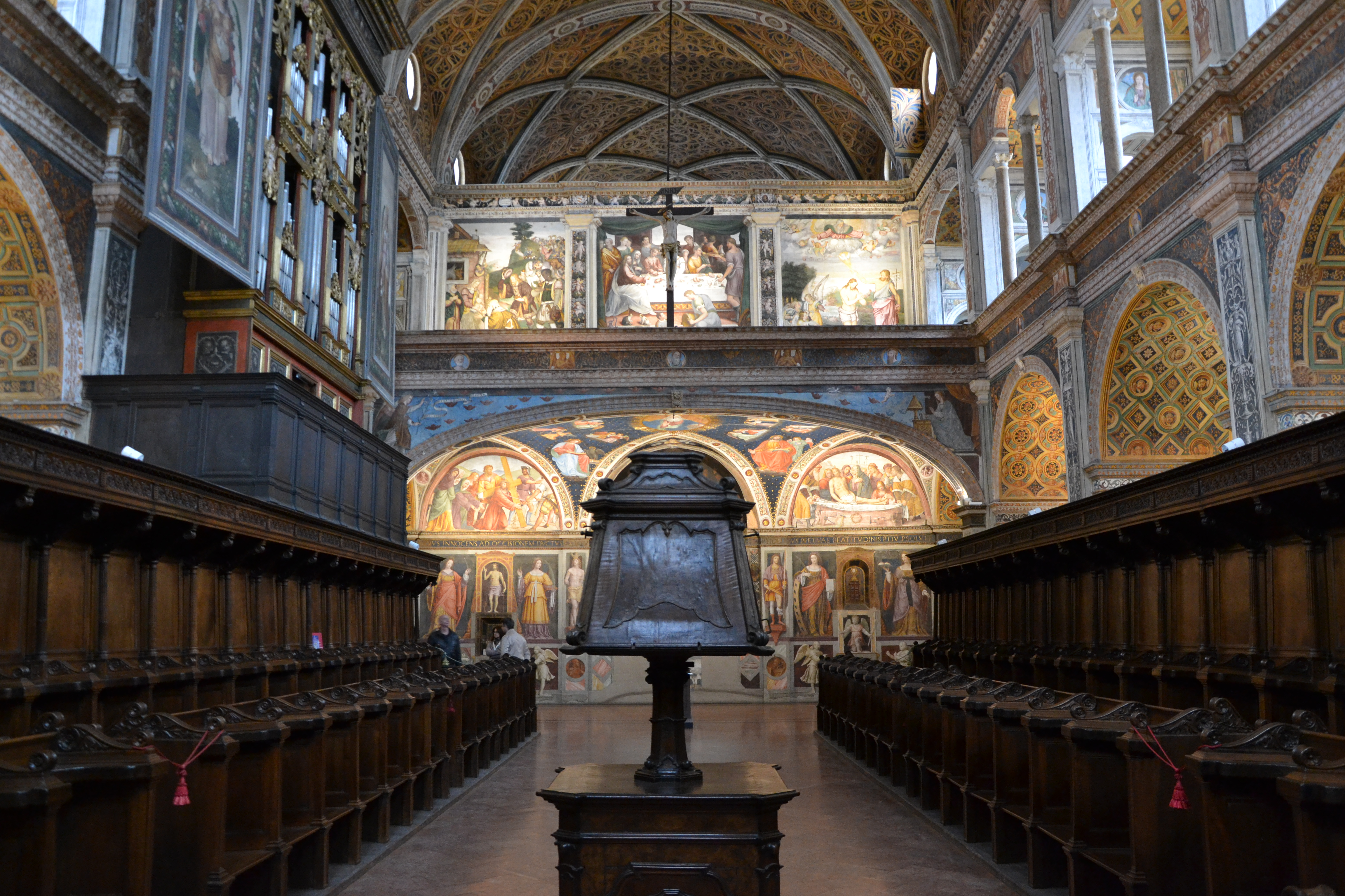 Milano - San Maurizio al monastero maggiore, aula delle monache, XVI secolo